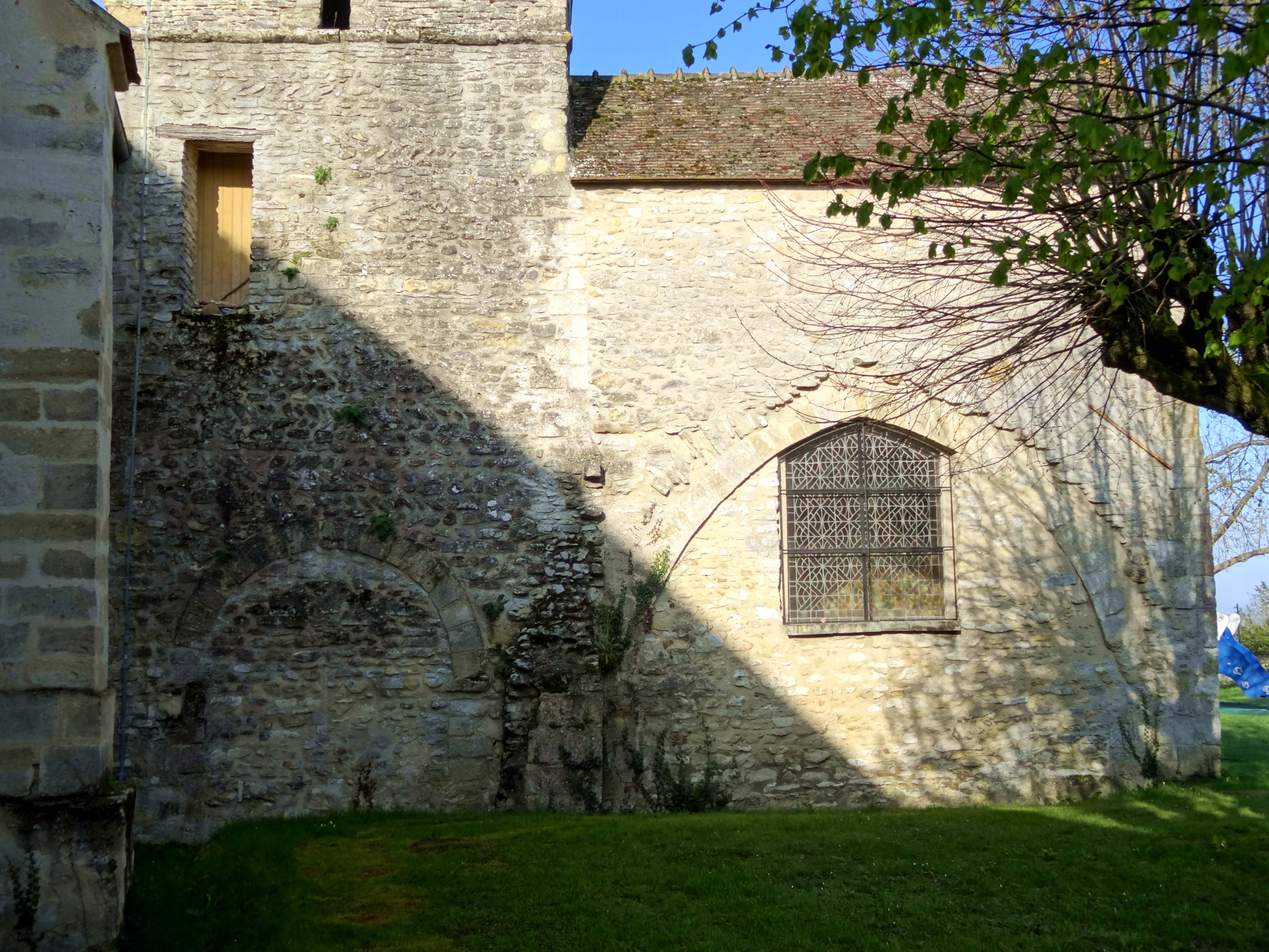 Église Saint-Martin de Follainville - voir titre.